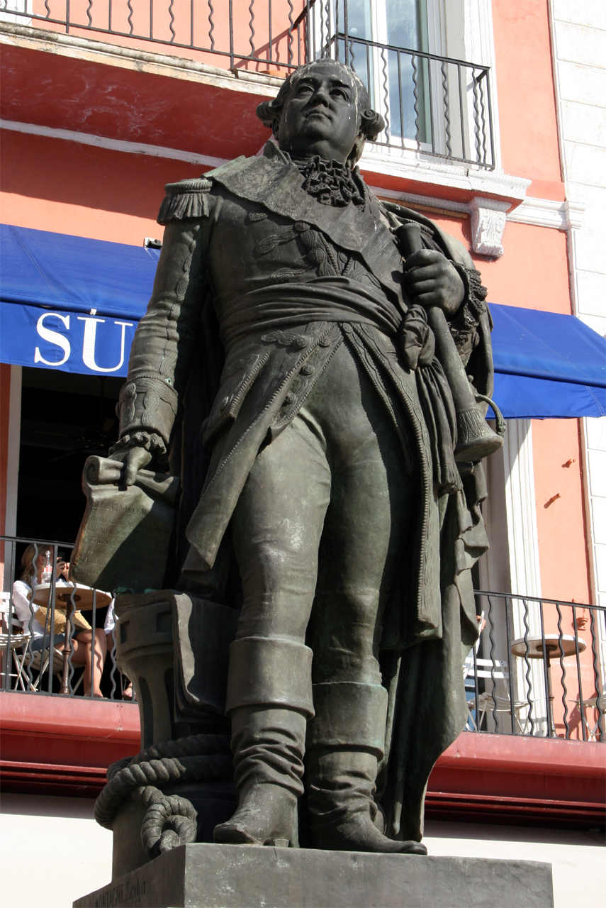 Statue du bailli de Sufrren à Saint6tropez